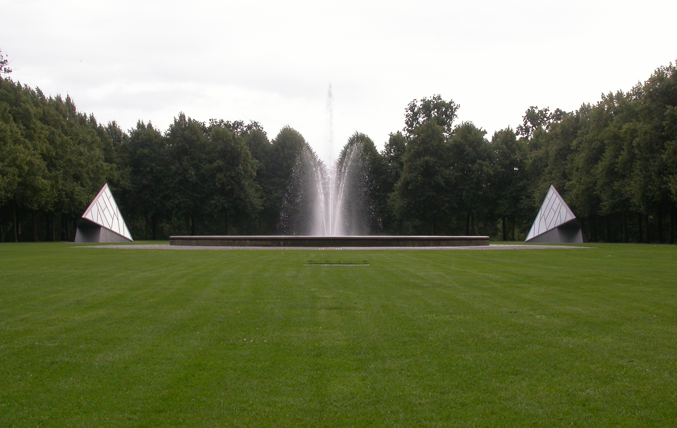 Cisternerne at Søndermarken in Copenhagen, Denmark